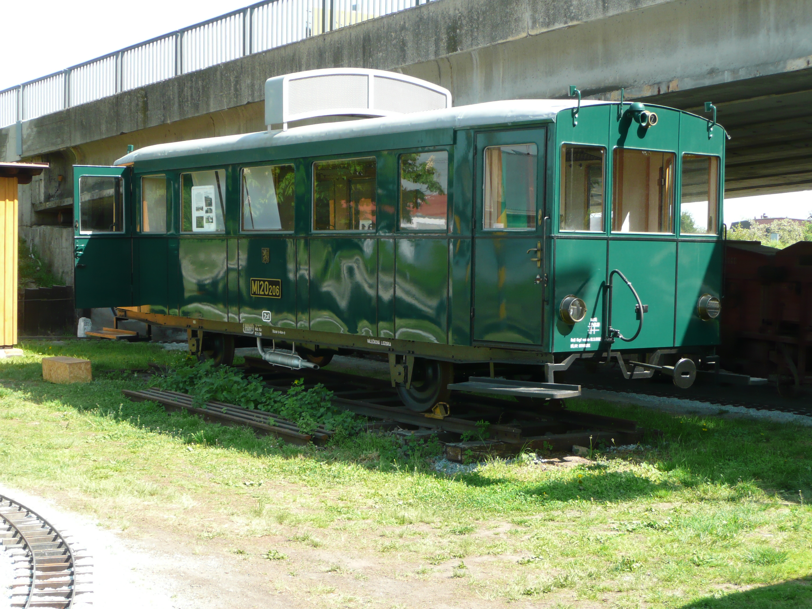 Gesamtansicht des renovierten M 120 206